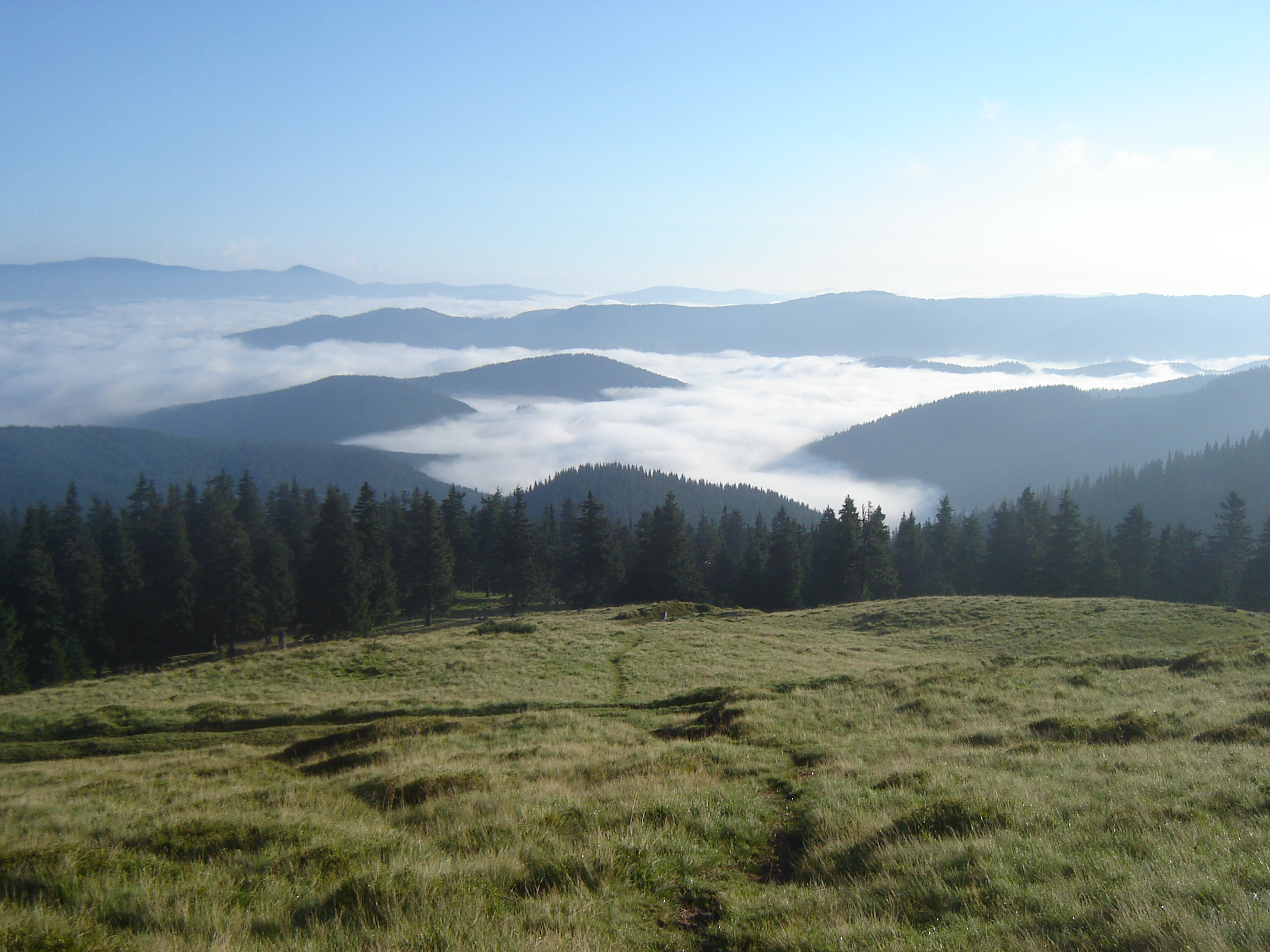 Карпатська панорама біля гори Петрос.